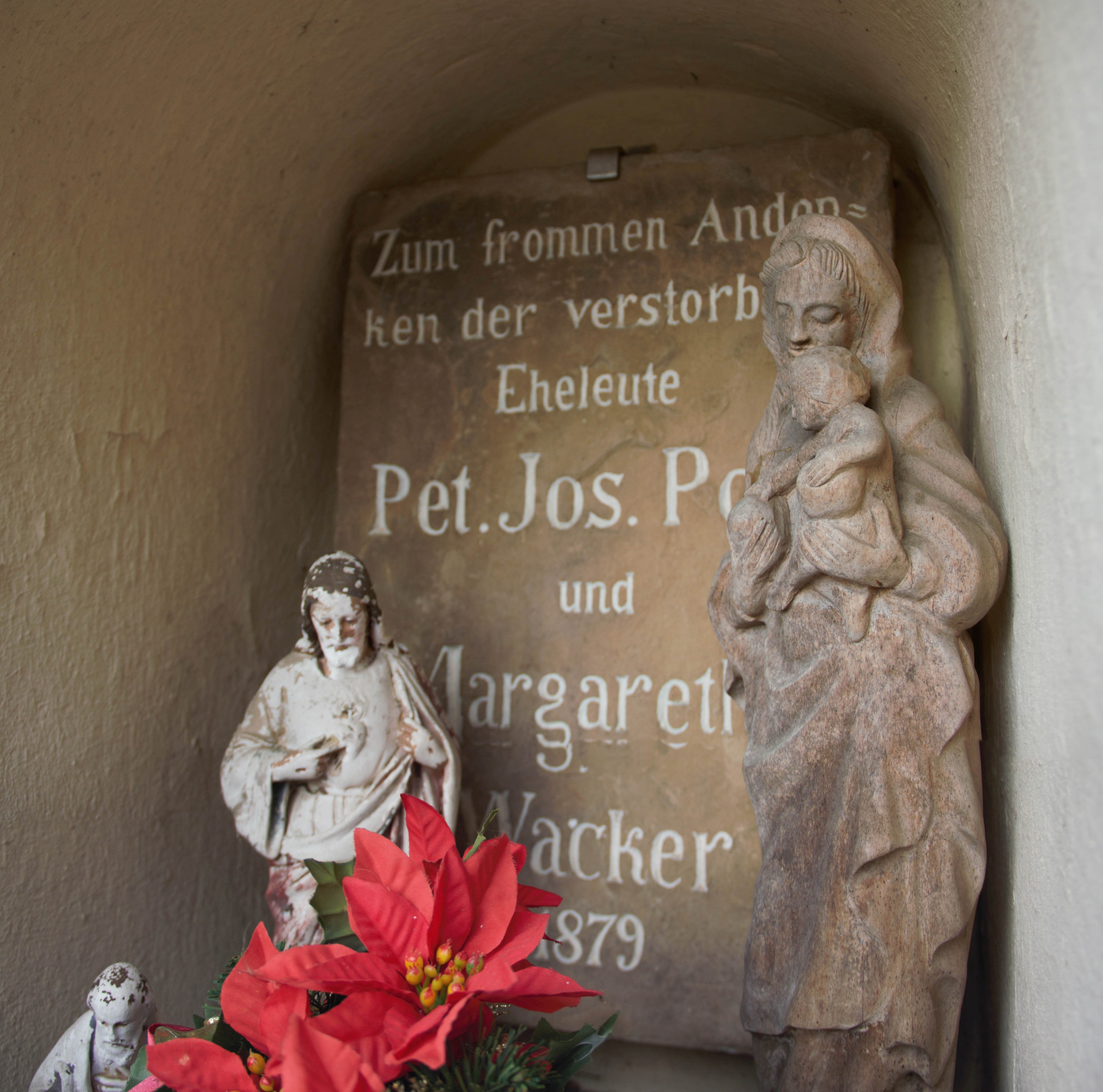 Das Innere des Heiligenhäuschen Deesem Oberdorfstraße Ecke Mittelstraße